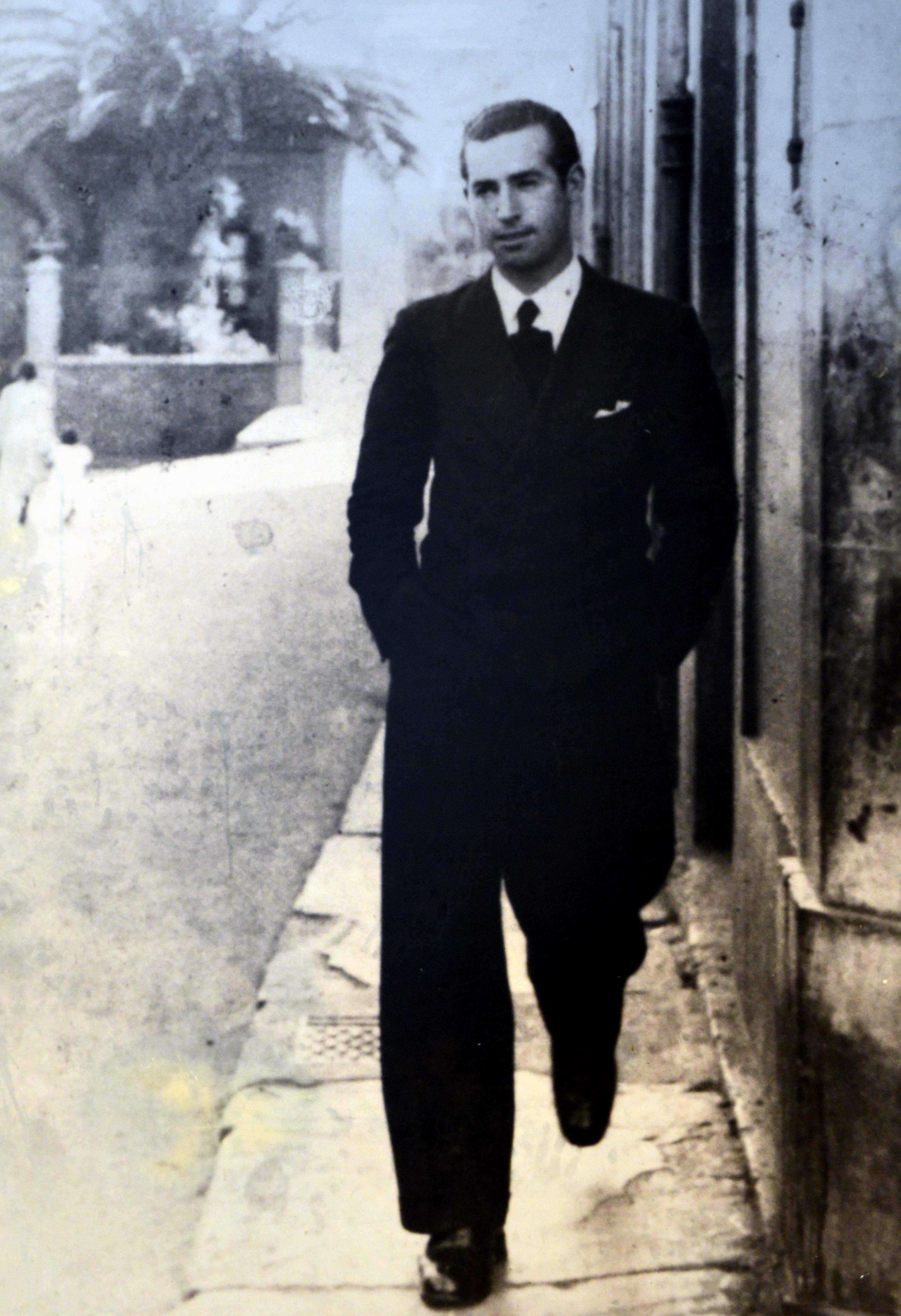 Antonio Rodríguez García, alias Antón: última fotografía del artista tomada en Candás (1936) [Tomada de un panel a la entrada del Centro de Escultura de Candás. Museo Antón (2018)].